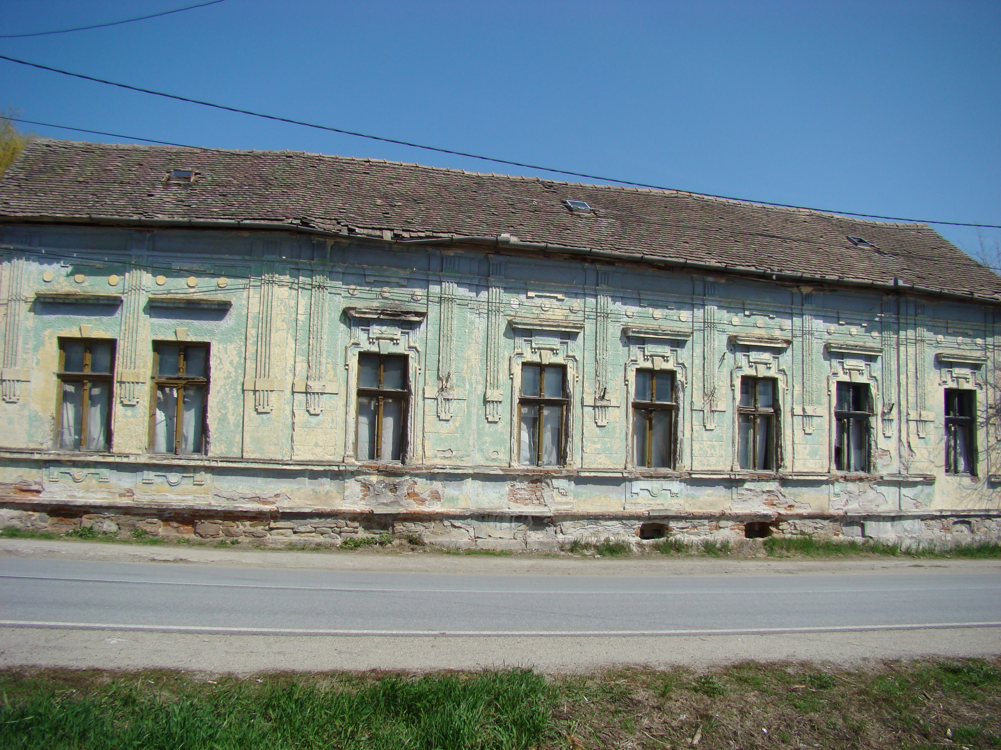 Clădirea fostei preturi, Dobra, județul Hunedoara